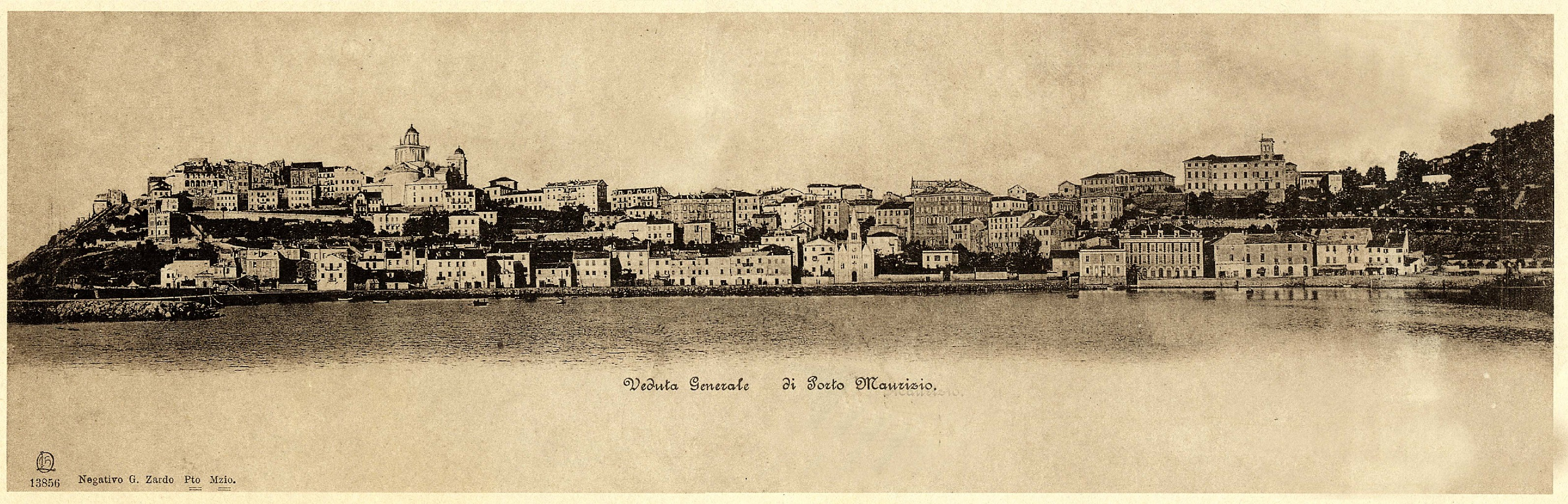 Porto Maurizio all'inizio del '900, Imperia (Italy)